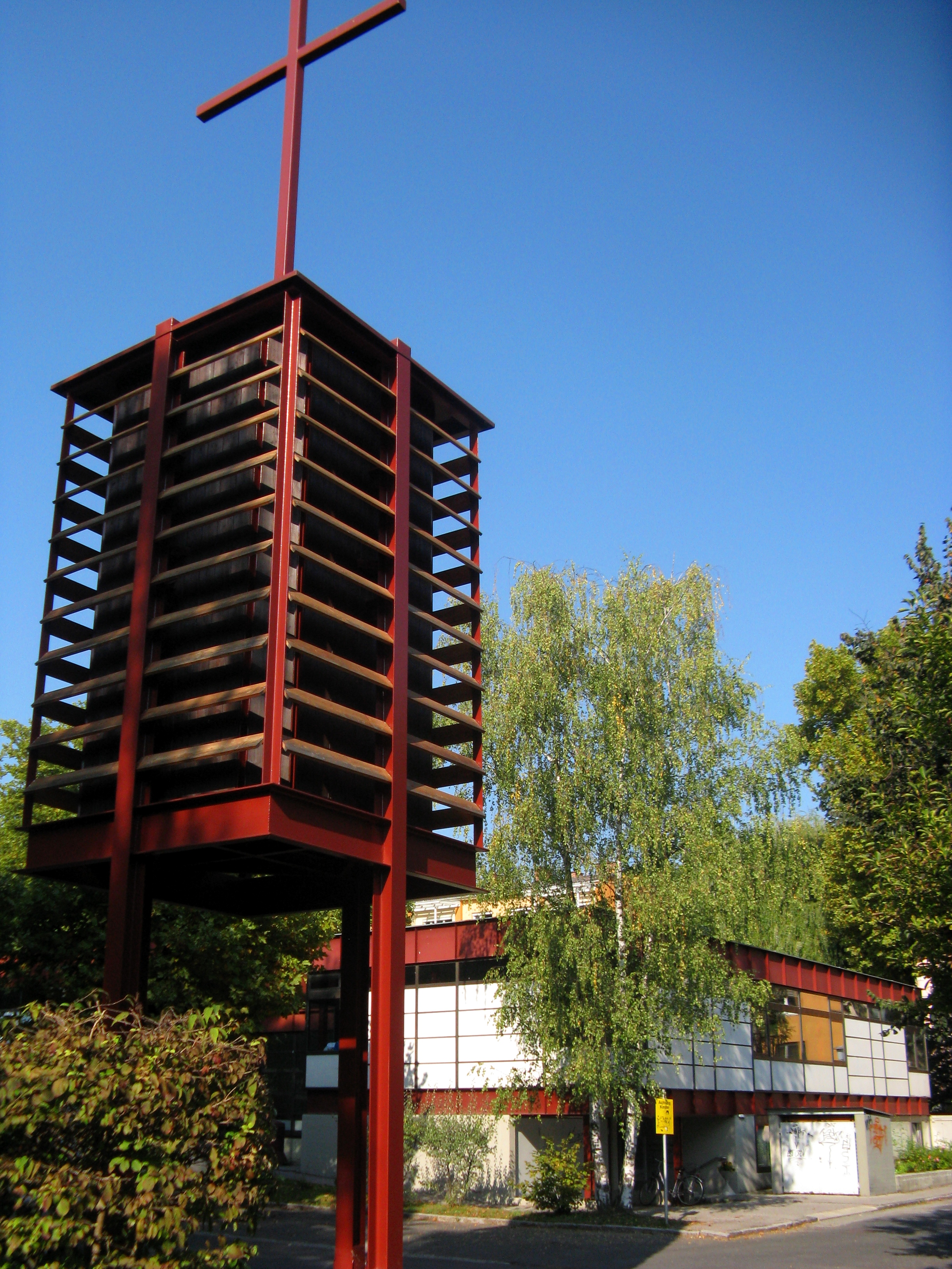 Kath. Pfarrkirche hl. Paulus, Pfarrzentrum St. Paul/Eisteich, Waltendorf, Graz.